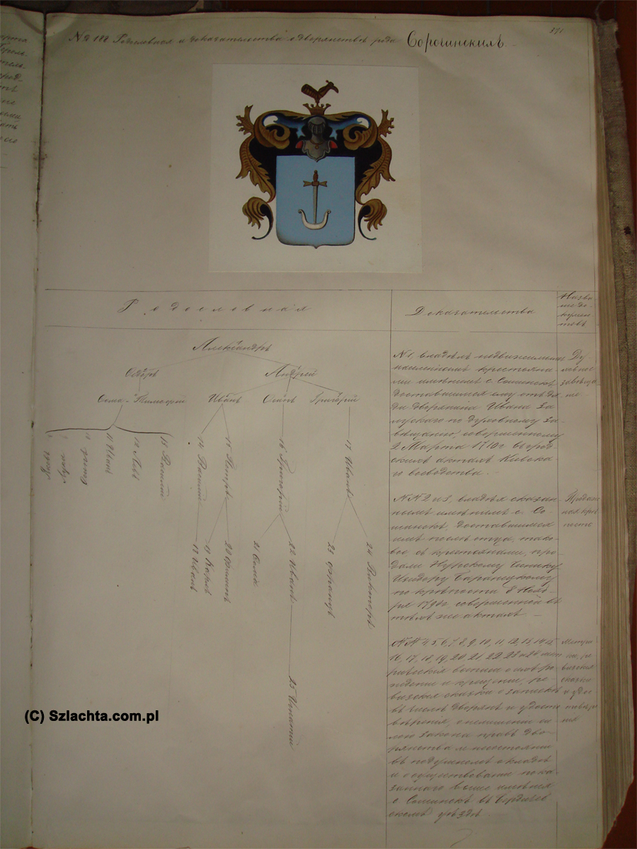 Zdjęcie zrobione przez biuro genealogiczne Nowina. Państwowe Archiwum Obwodu Żytomierzskiego, Ukraina. Zespół 146, inwentarz 1, nr 476, karta 371.